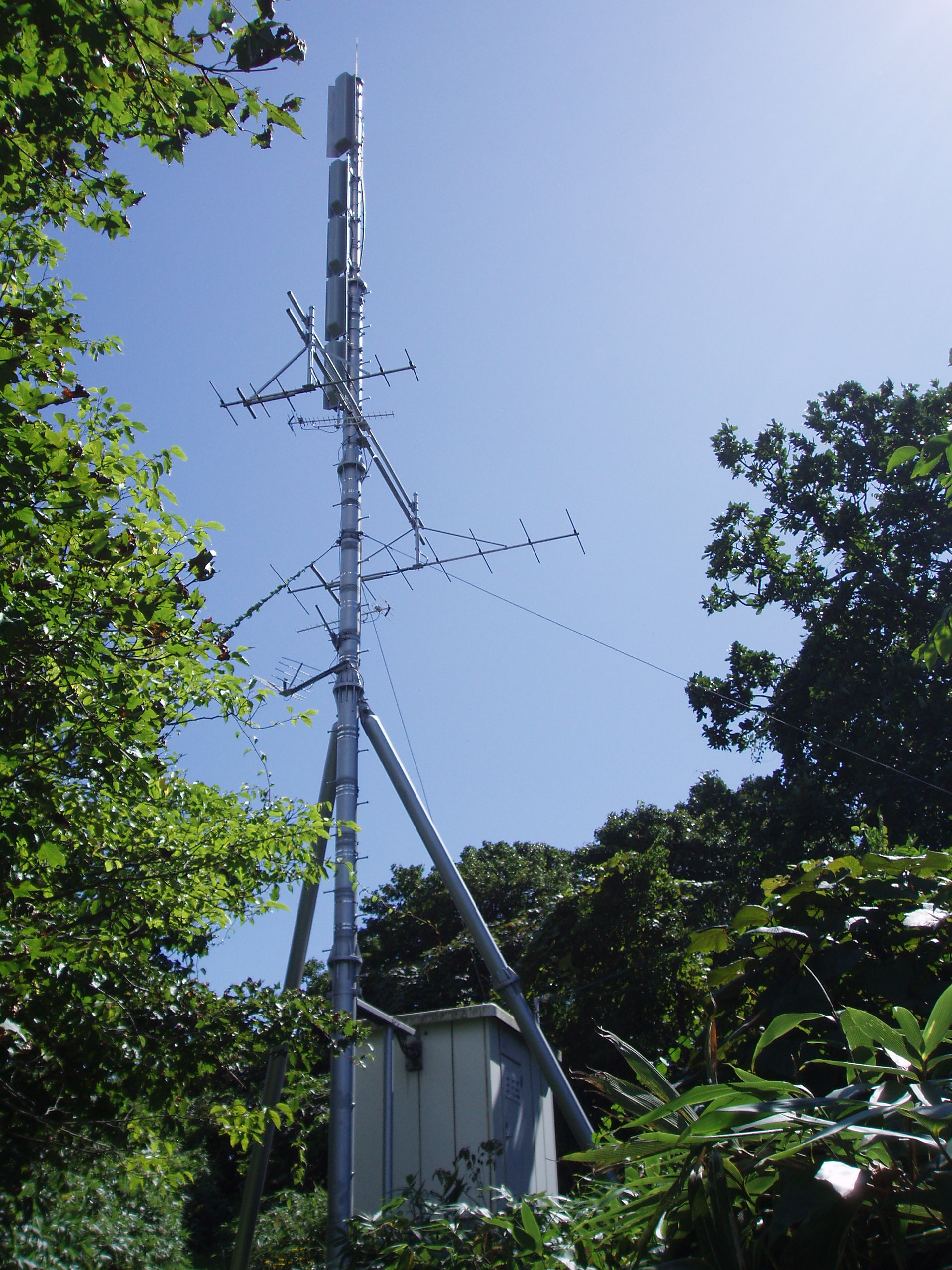 鷲別中継局